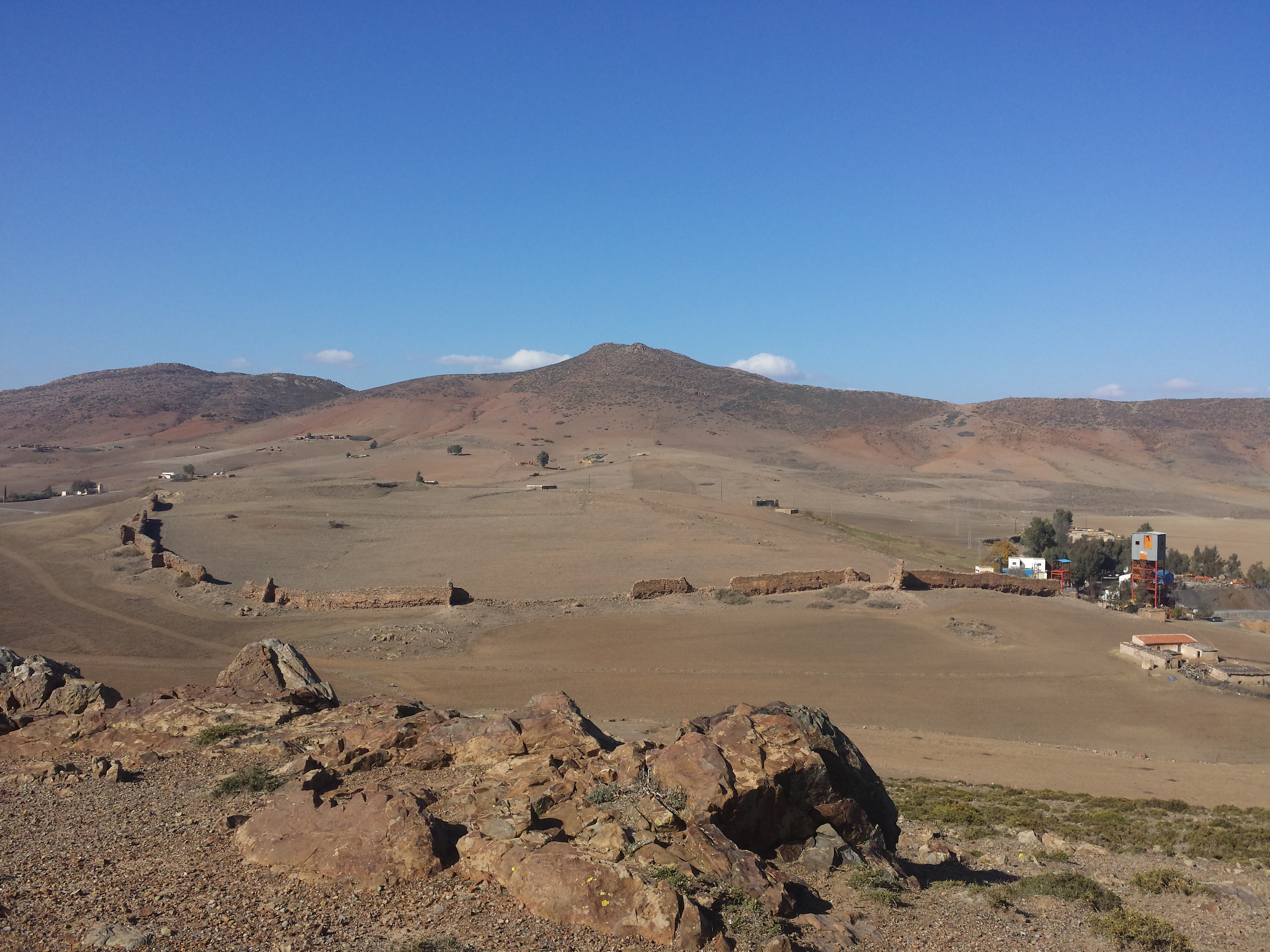 صورة للأصوار المهدمة لمدينة عوام التاريخية